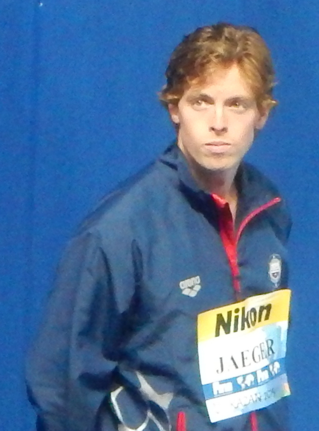 Коннор Йегер на чемпионате мира в Казани